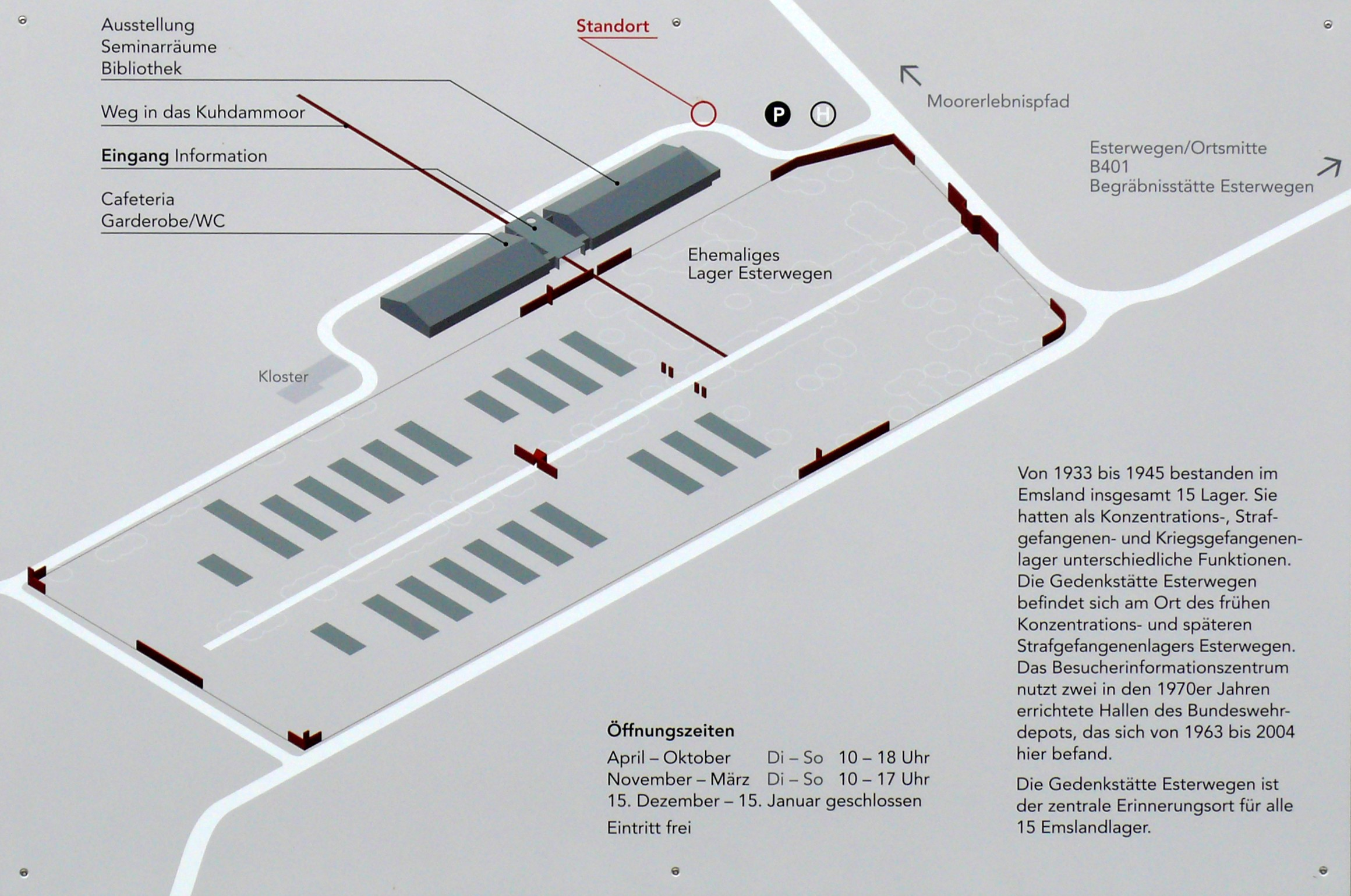 Plan der Gedenkstätte Esterwegen (Hinter dem Busch)